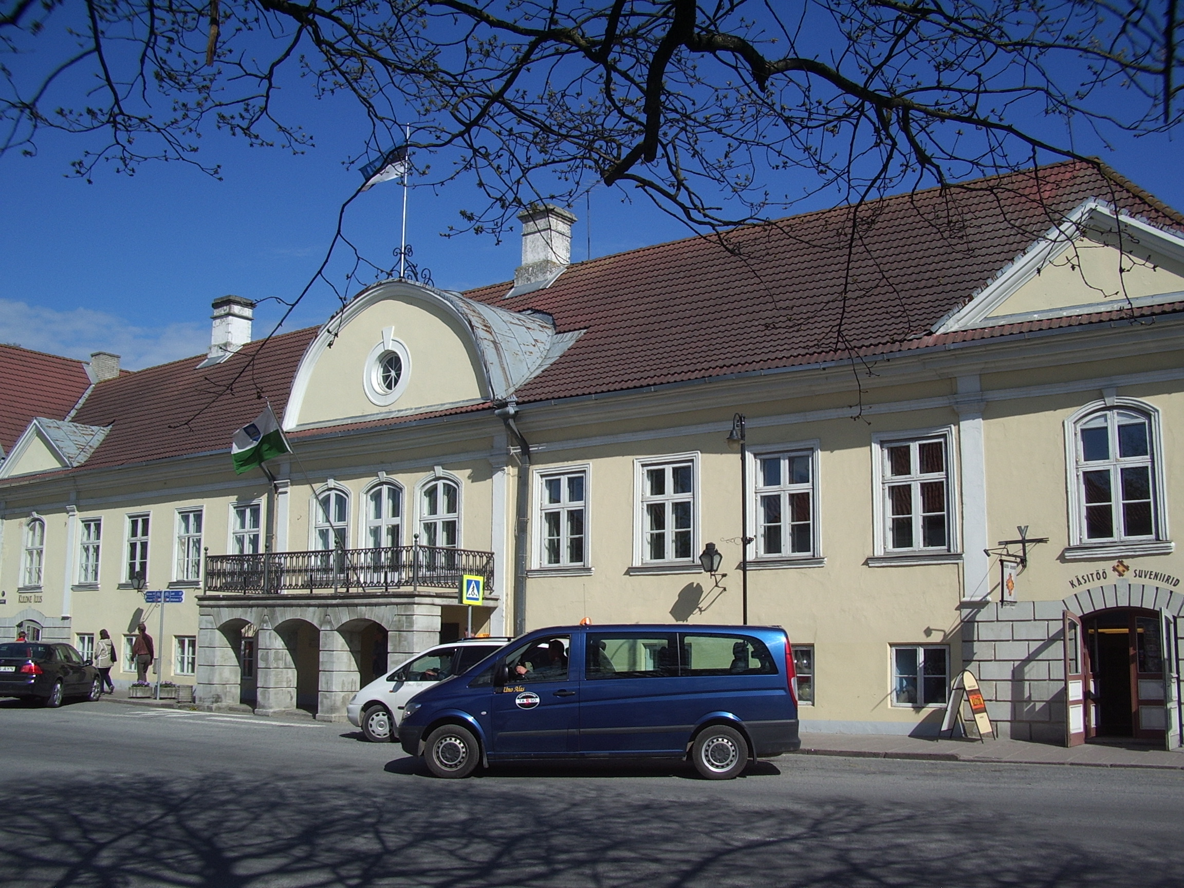 Rüütelkonna hoone ehk Saare Maavalitsuse hoone, Lossi tänav 1